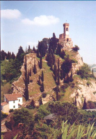 Durante mia gita ho fatto questo immagine durante Aprile 2005.